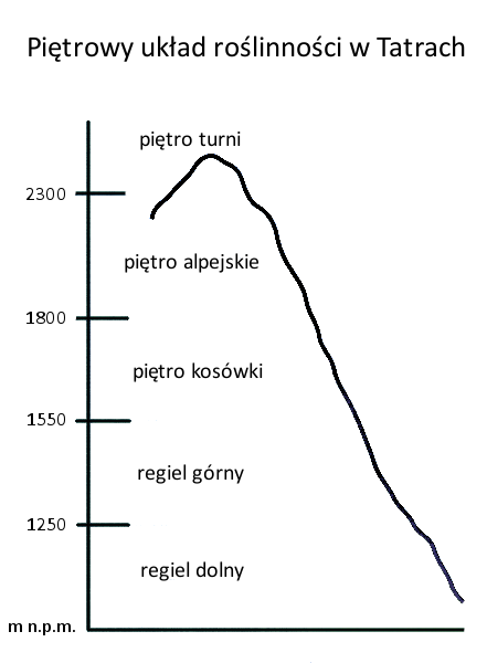 Piętrowy układ roślinności w Tatrach (po północnej stronie Grani Głównej)